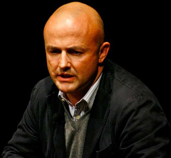 Gianluigi Nuzzi all'International Journalism Festival